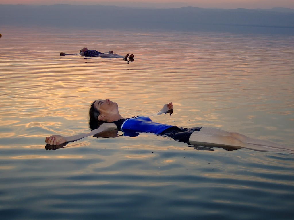 Toter-Mann-Position im Toten Meer